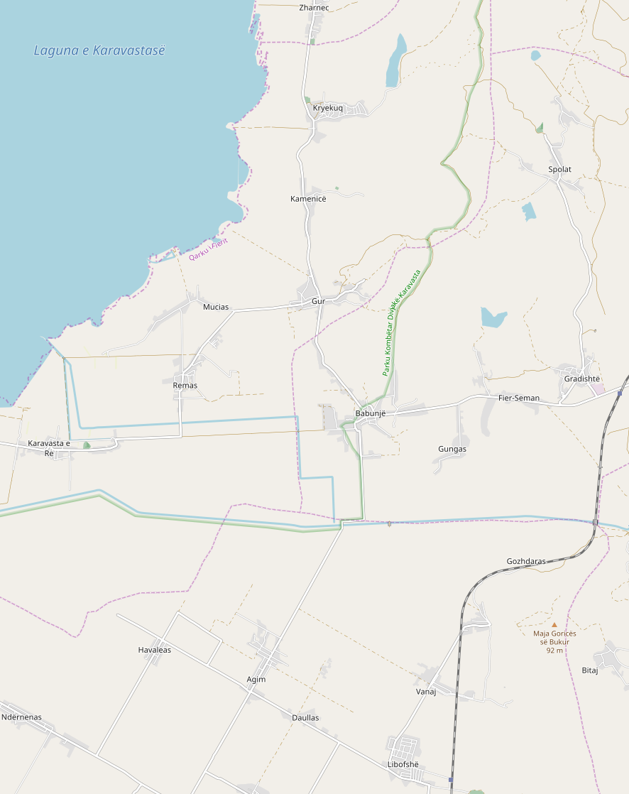 Vendndodhja e Babunjës